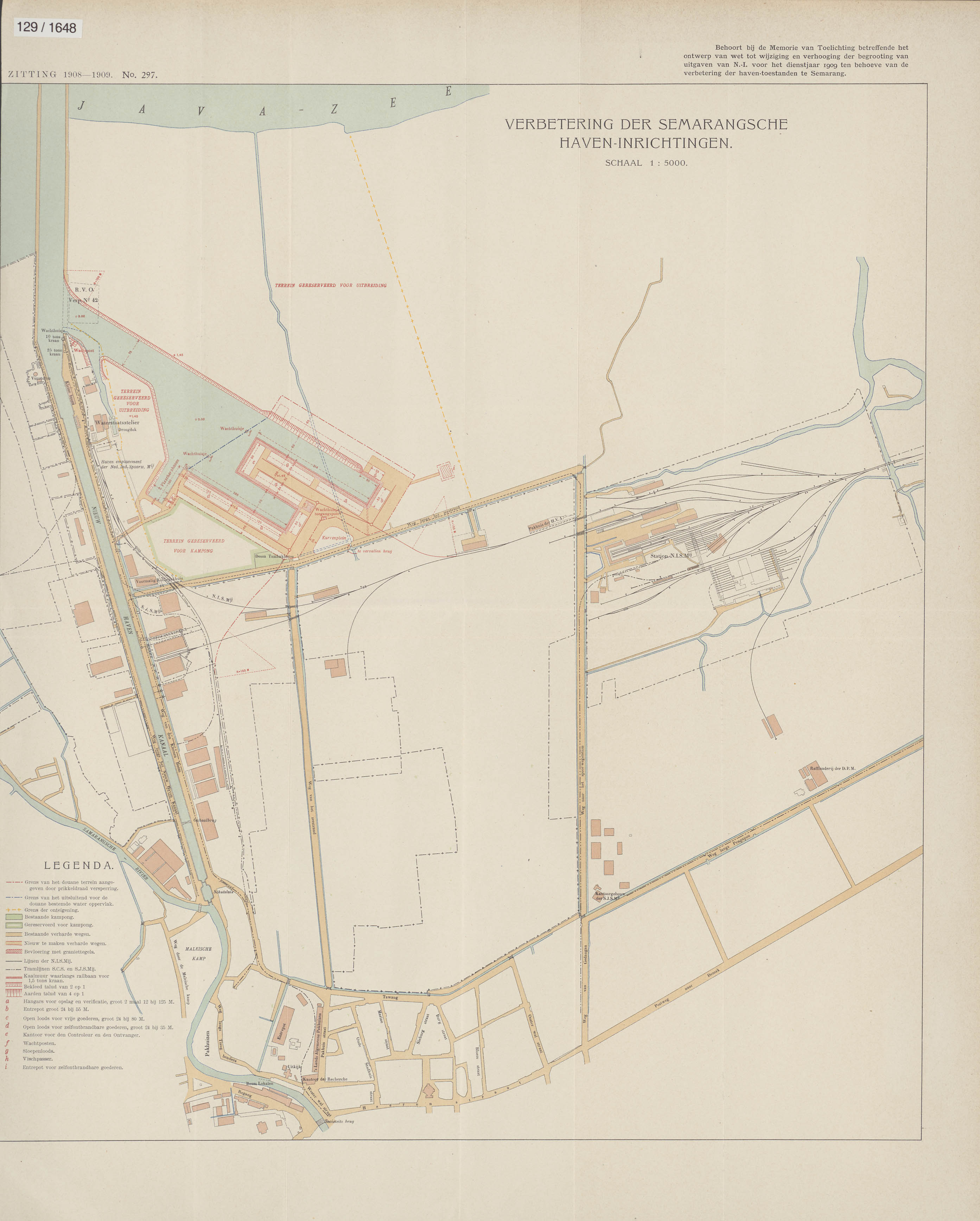 Op de kaart zijn de diverse afmetingen van de verbeteringswerken vermeldBehoort bij de Memorie van Toelichting betreffende het ontwerp van wet tot wijziging en verhooging der begrooting van uitgaven van Nederlandsch-Indi voor het dienstjaar 1909 ten behoeve van de verbetering der haven-toestanden te Semarang